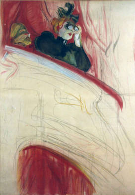 Cromolitografia d'una figura femenina en una llotja de teatre, pintat per Henri Toulouse-Lautrec